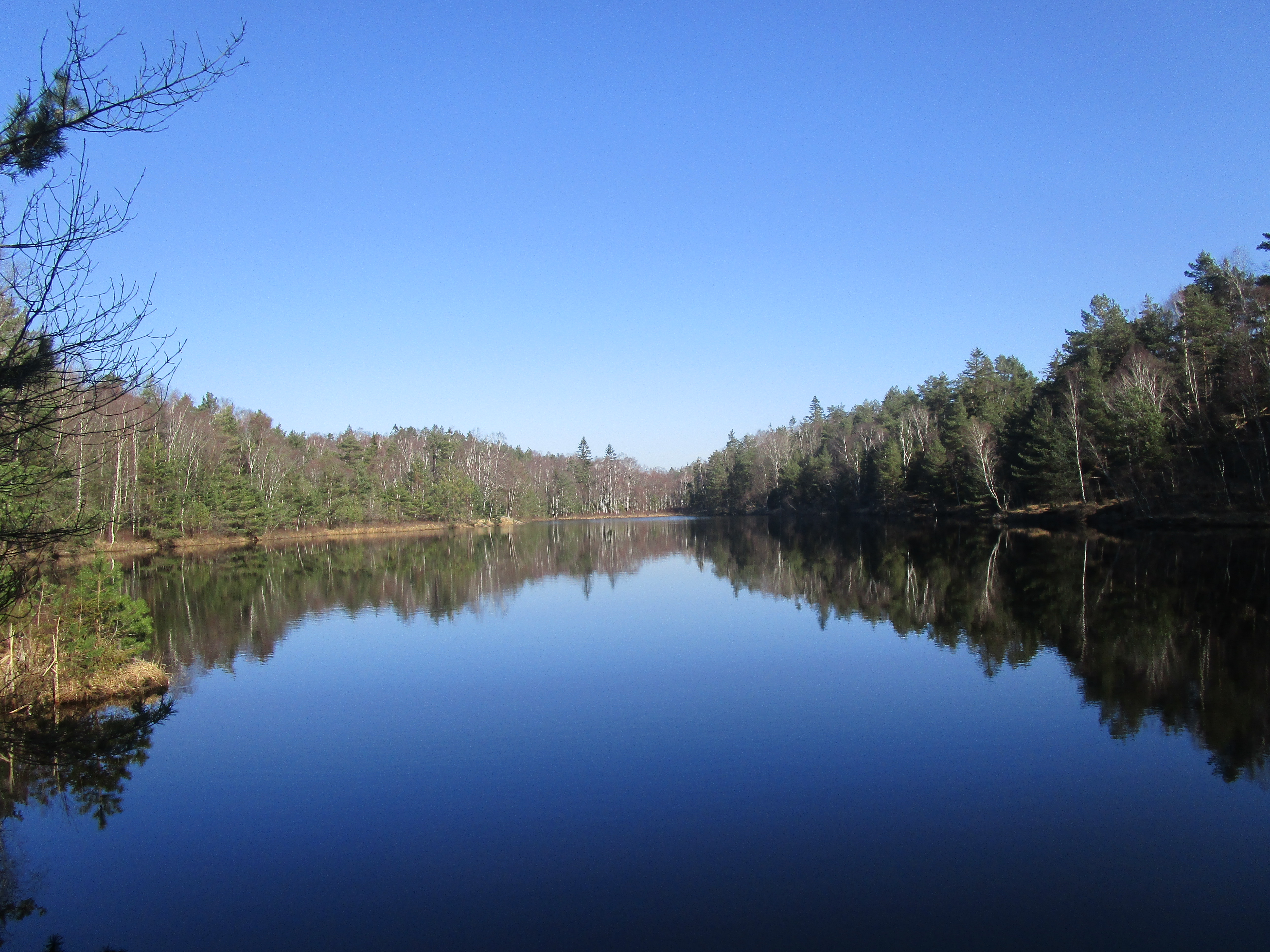 Stora Björketjärnen från södra änden 27 mars 2020.